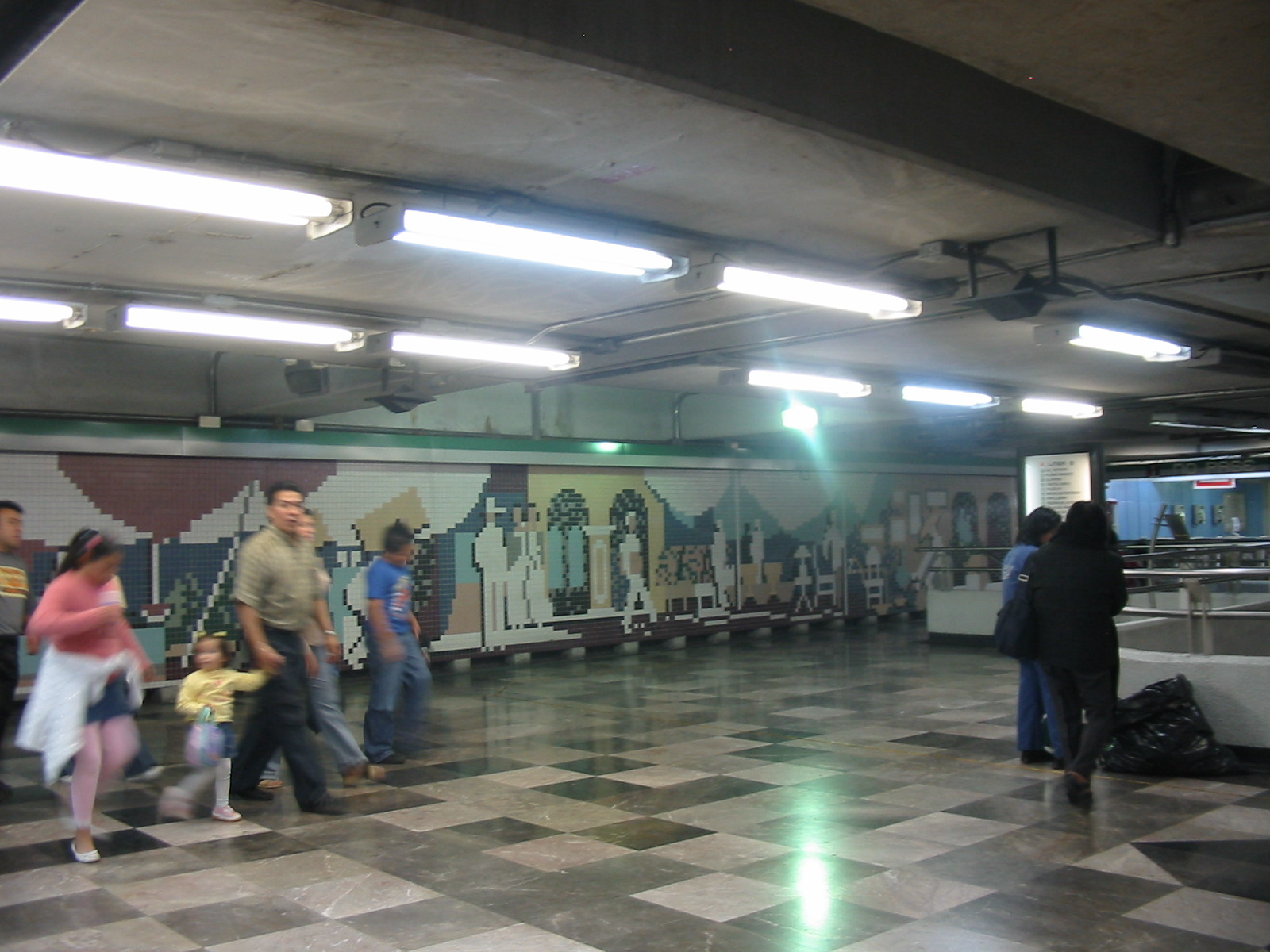 Tile Mural at Metro Lagunilla in Mexico City